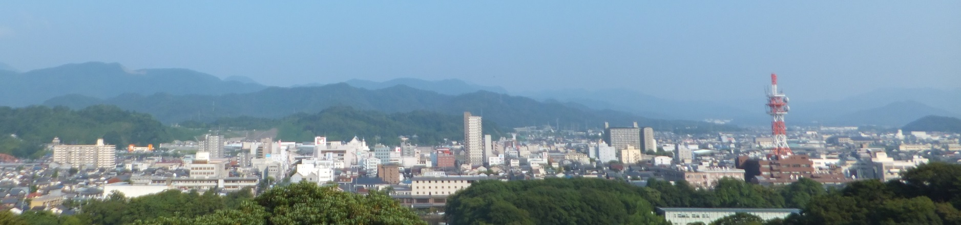 彦根市中心部